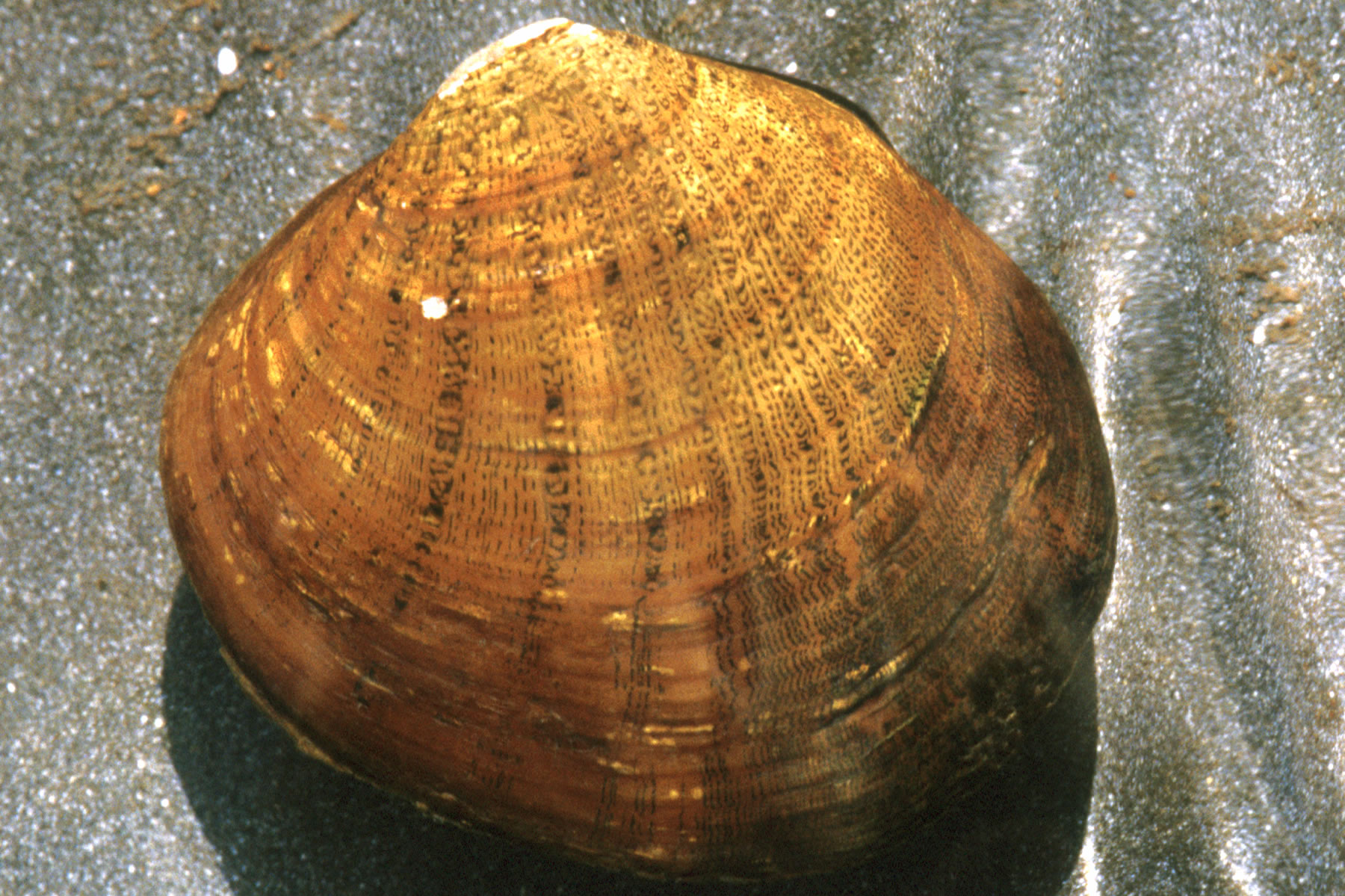 Dromus dromas